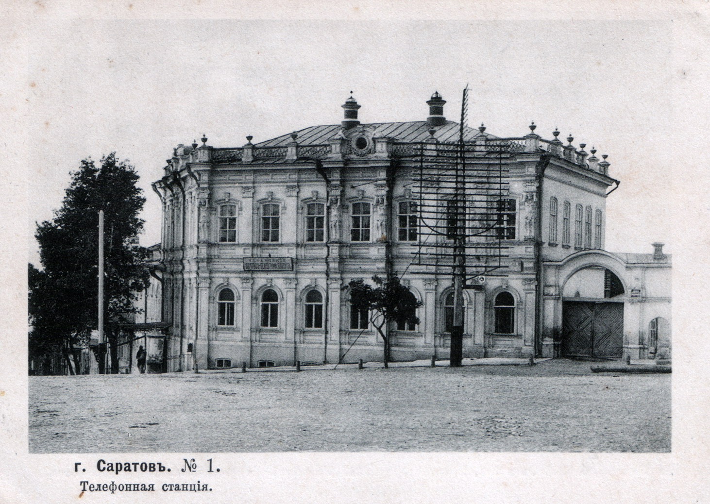 Открытка с изображением телефонной станции в доме Рейценштейн (Колпакова), Саратов